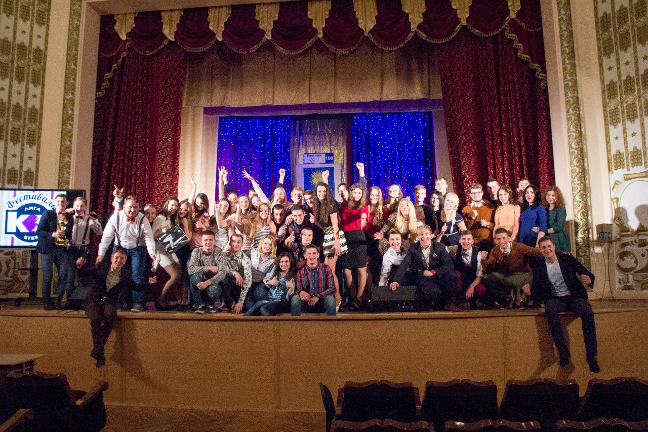 БГПУ сегодня.